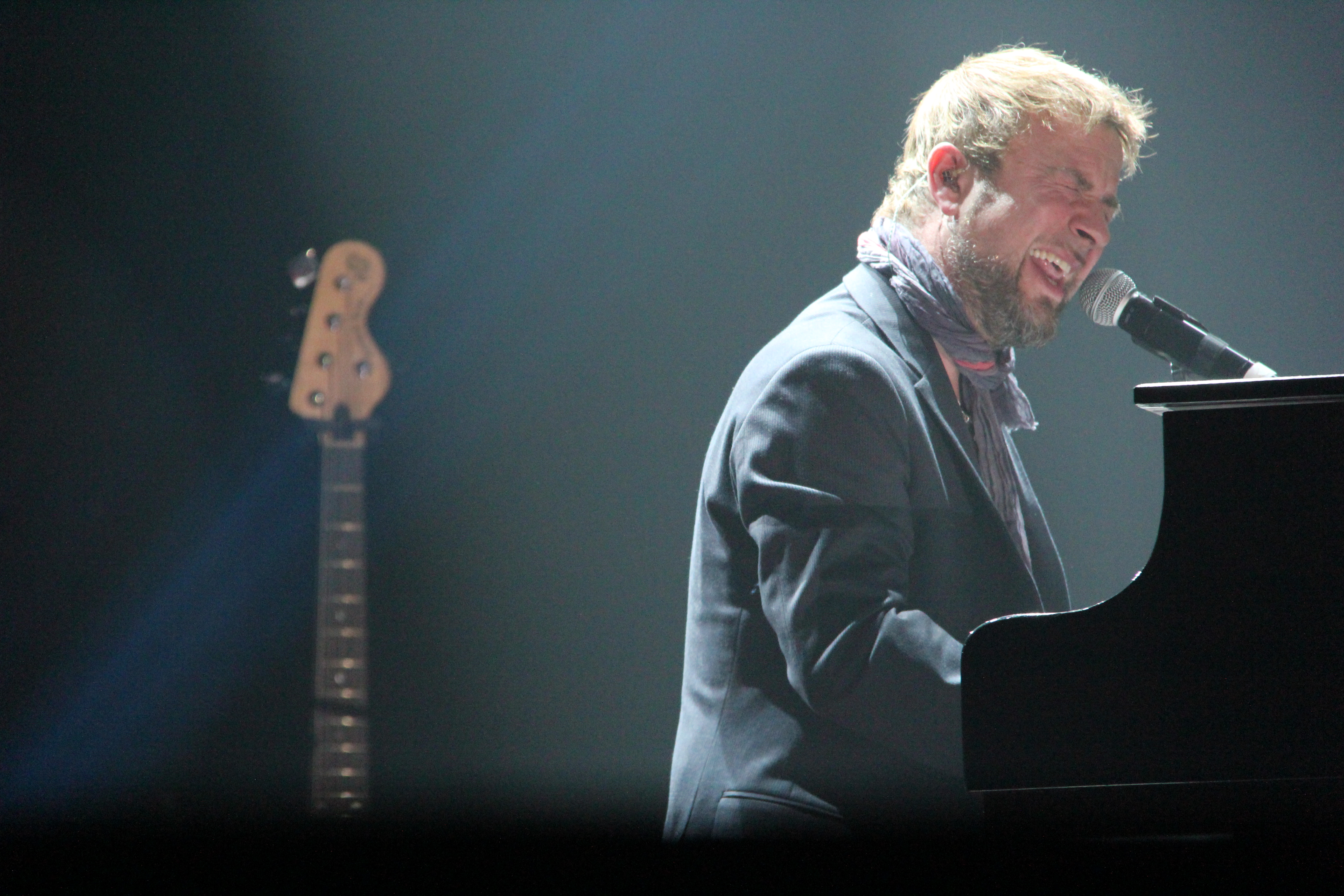 MARCO MASINI IN TOUR 2012